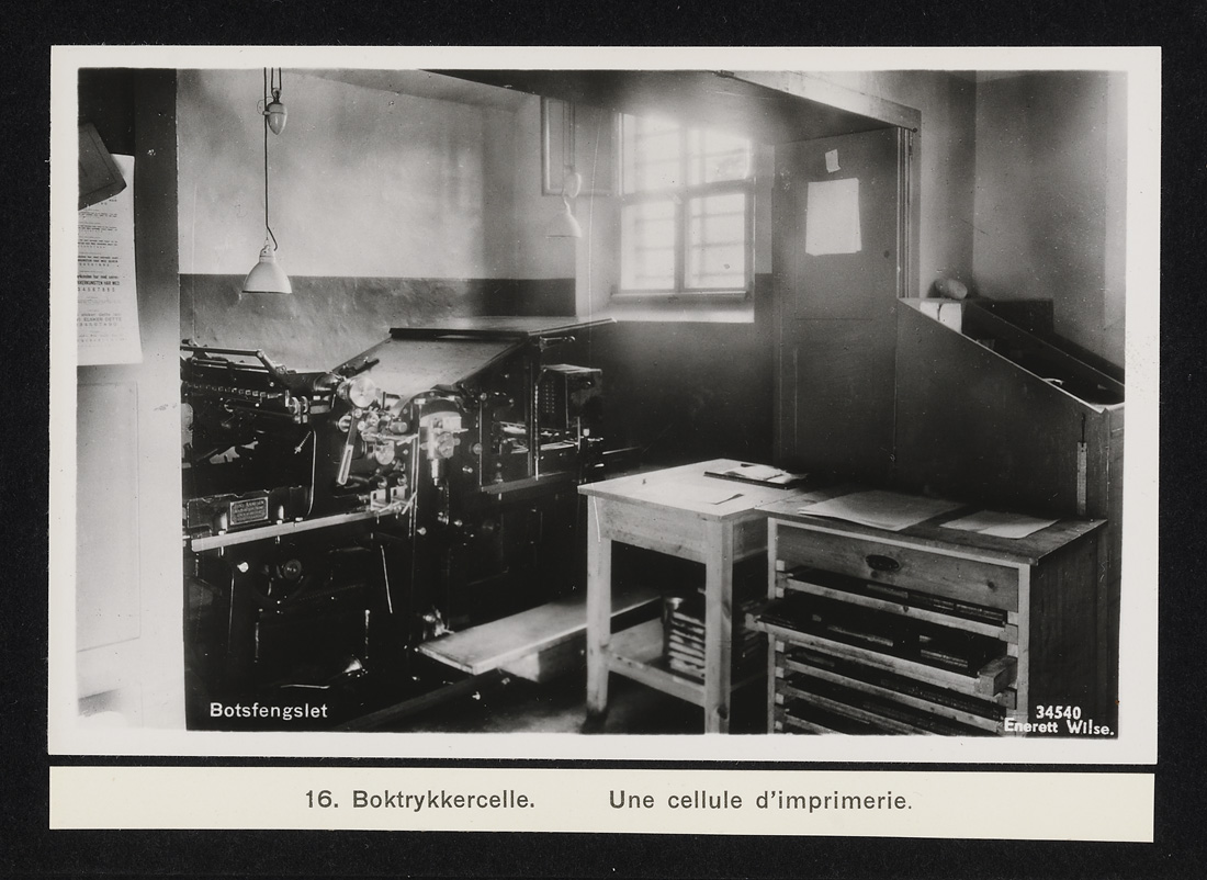 Wilse, Anders Beer Interiør, Boktrykkercellen. Fotografier fra Botsfengselet i Oslo NMFF.000146-16 Enkeltbilde fra album NMFF.000146